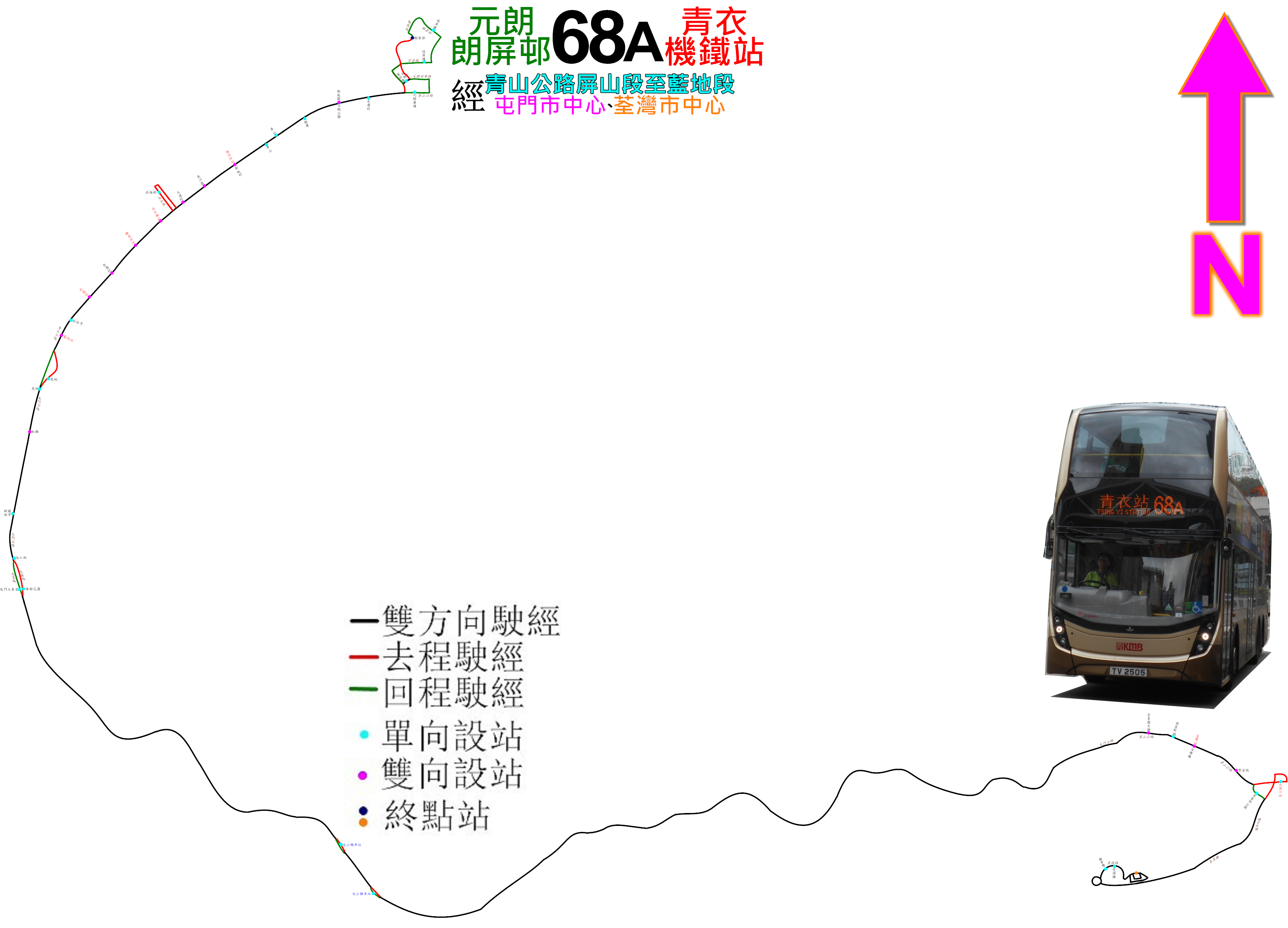 中文（香港）: 九巴68A線的走線圖